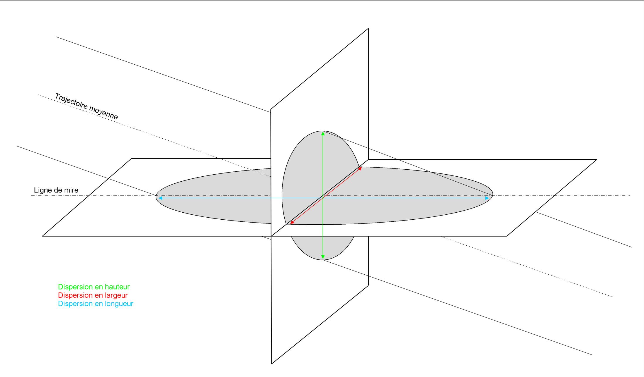 Dispersion en hauteur, largeur et longueur de la gerbe d'arme à feu.